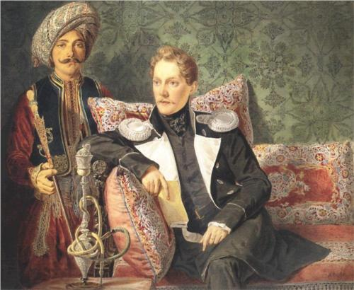 Портрет военного со слугой